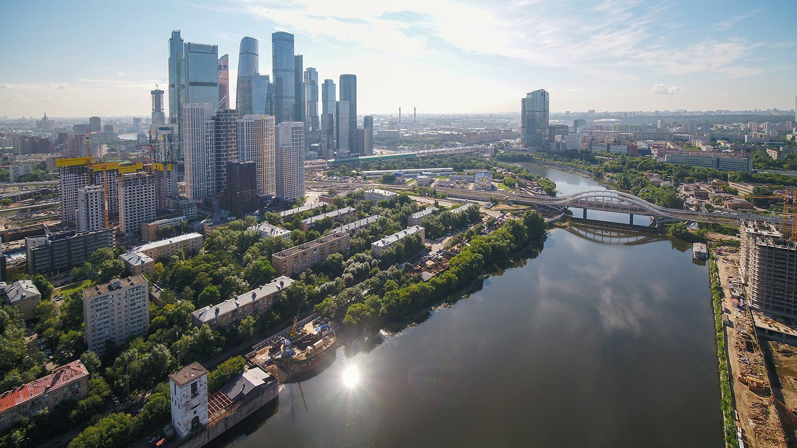 Осмотр реконструкции Филевского канализационного канала. С. Собянин.